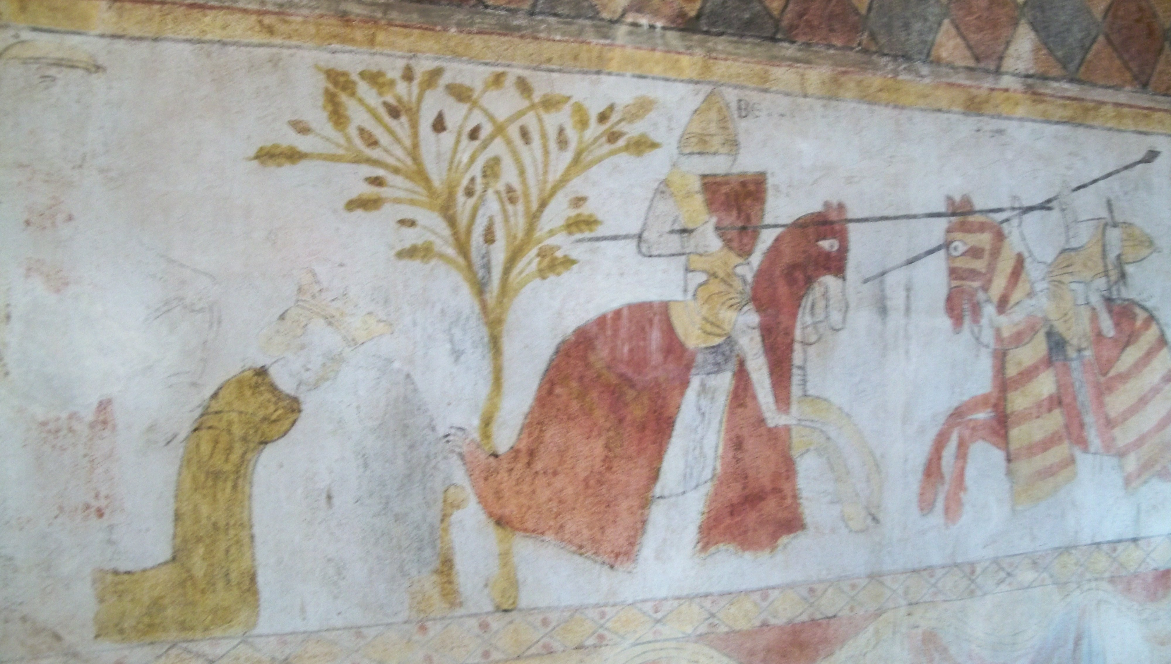 fresques de la Tour Ferrande à Pernes les Fontaines, Vauccluse, France